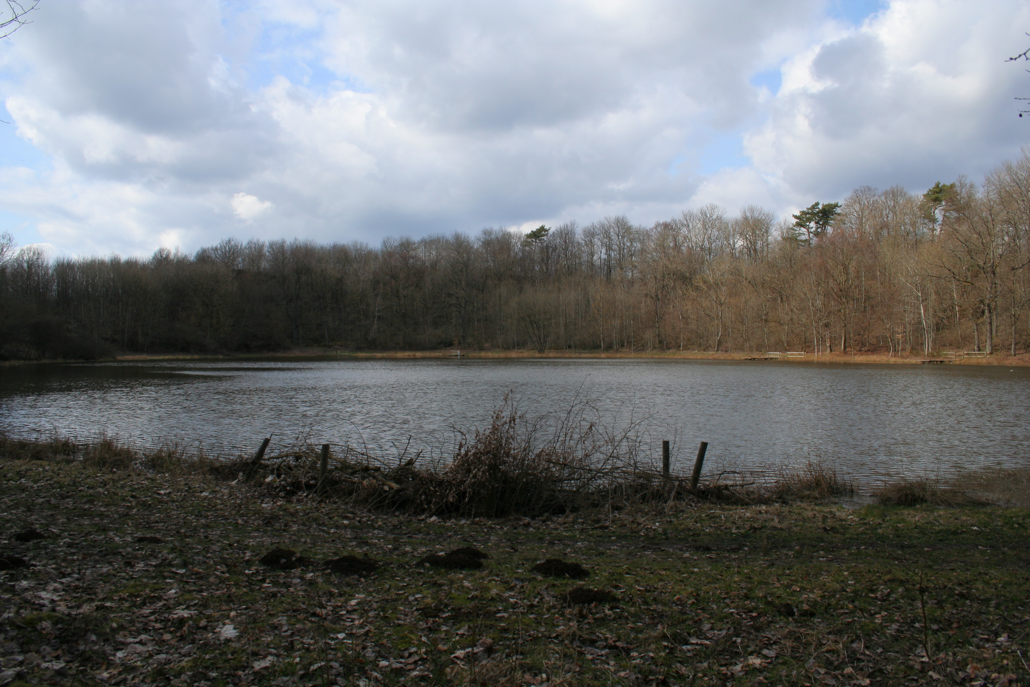 Windsborner Bergkratersee in der Vulkaneifel